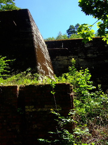 Wolfsschanze - "Gästebunker"